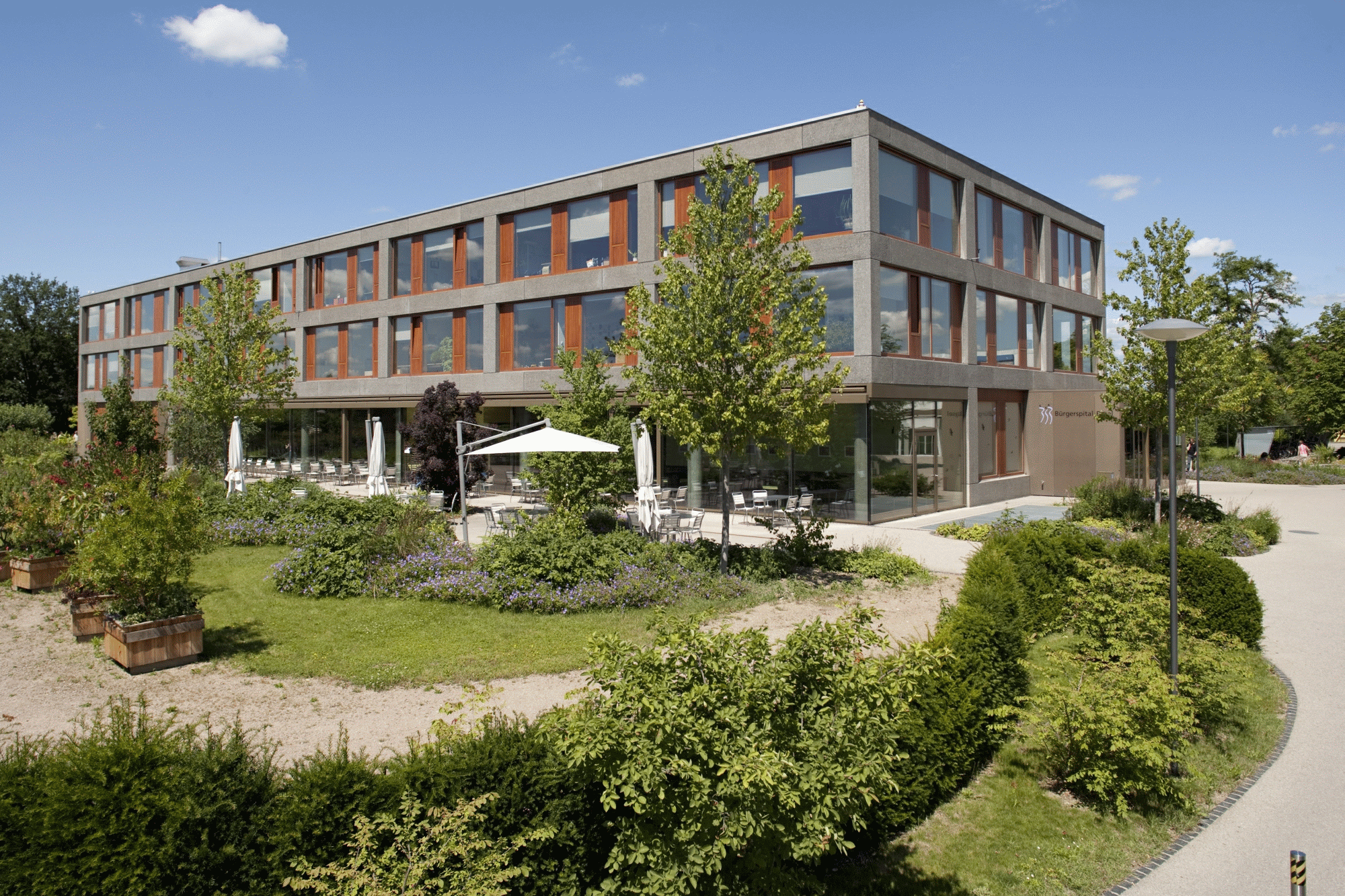 Bürgerspital Basel